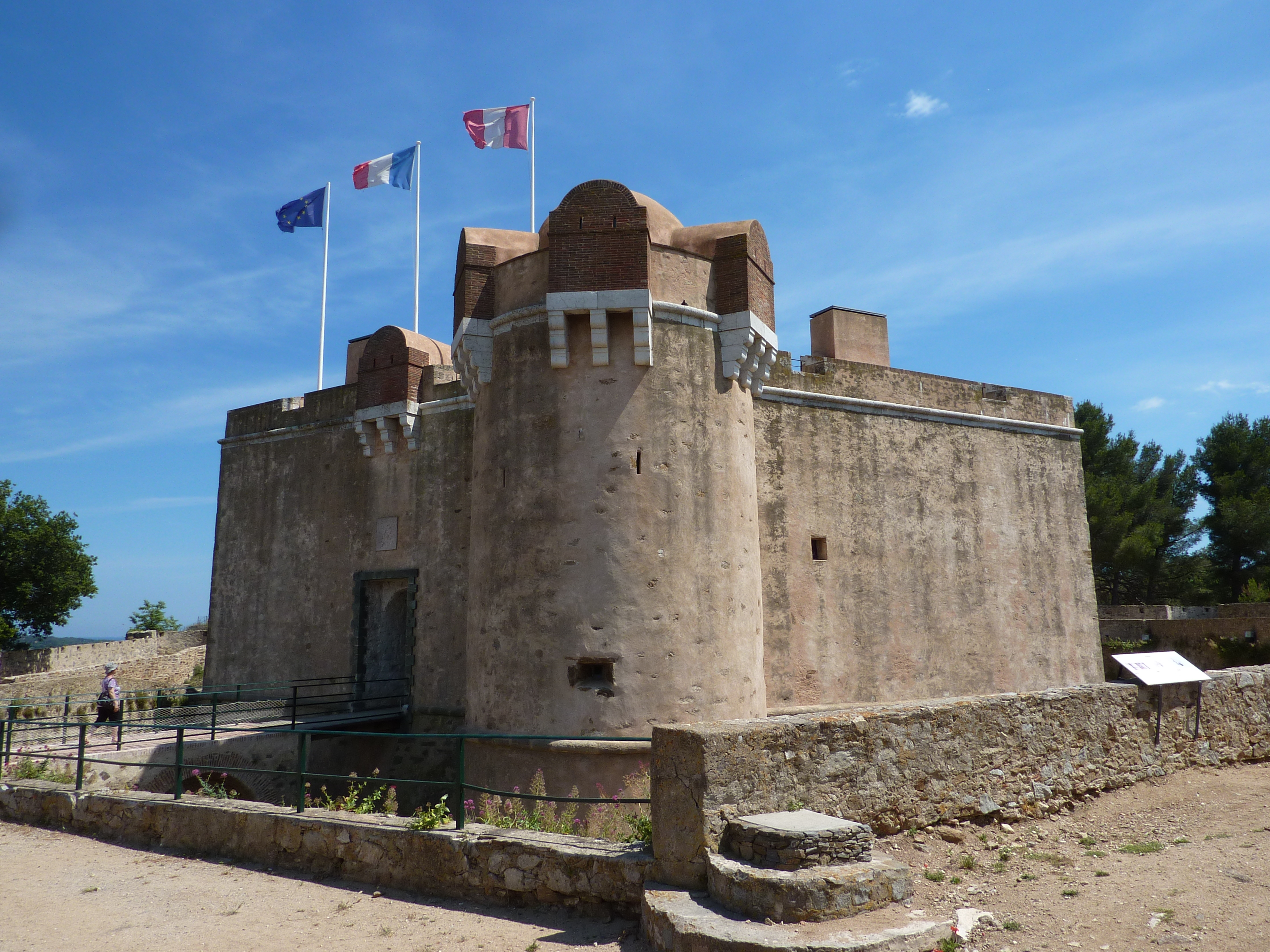 Musée d'histoire maritime ouvert depuis le 24 juillet 2013 dans les 18 salles du donjon rénové de la citadelle (classée monument historique) de Saint-Tropez (83990 Var). Musée des évolutions des activités maritimes - tant tropéziennes que françaises - de la pêche et du cabotage à la navigation transatlantique et à la marine de guerre.